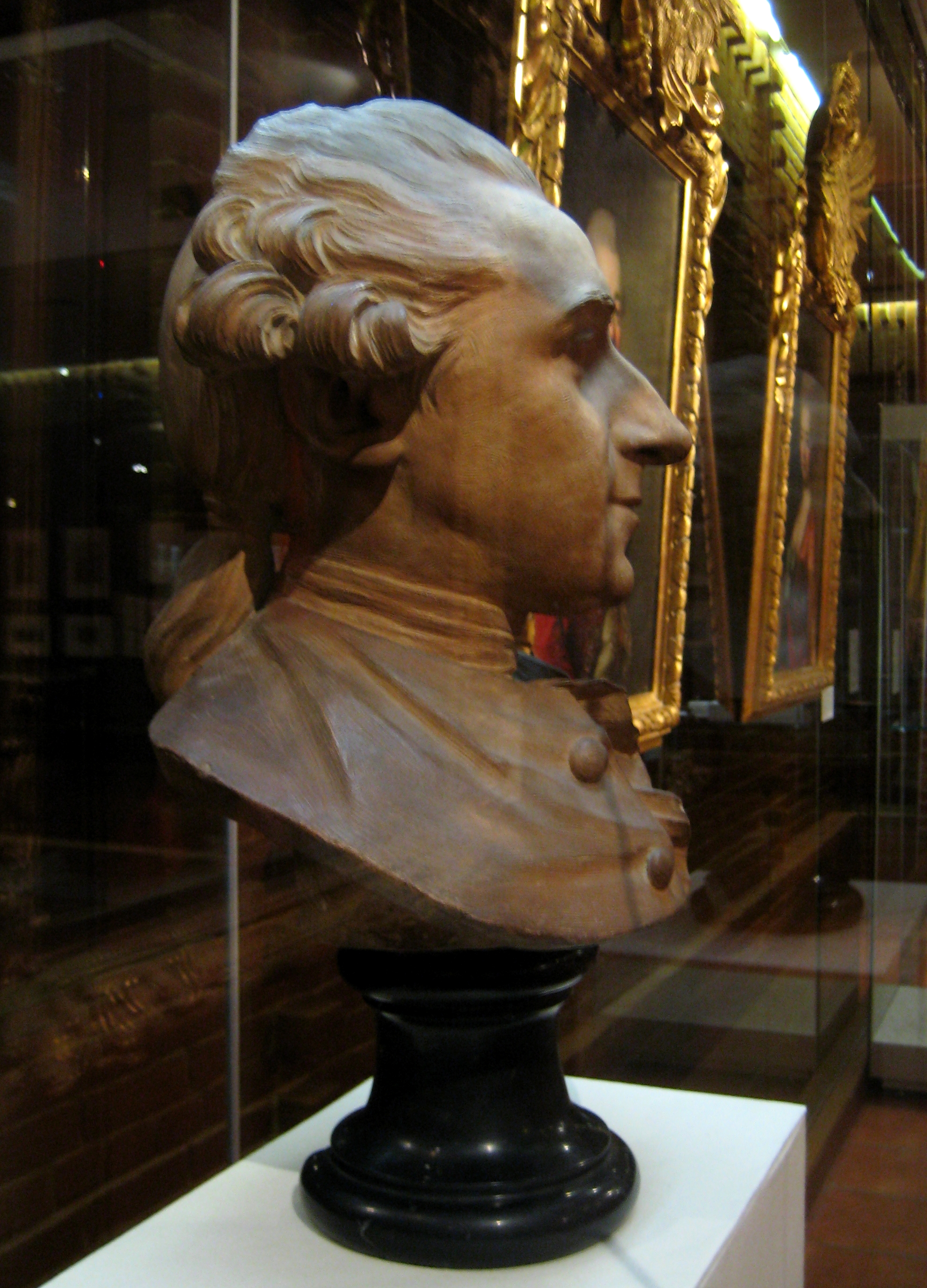 М.А. Колло. Портрет князя Д.А. Голицына. 1766. Терракота. Из собрания Давида Вейла, президента совета музеев Франции. В настоящее время - собрание Подстаницких, Москва.